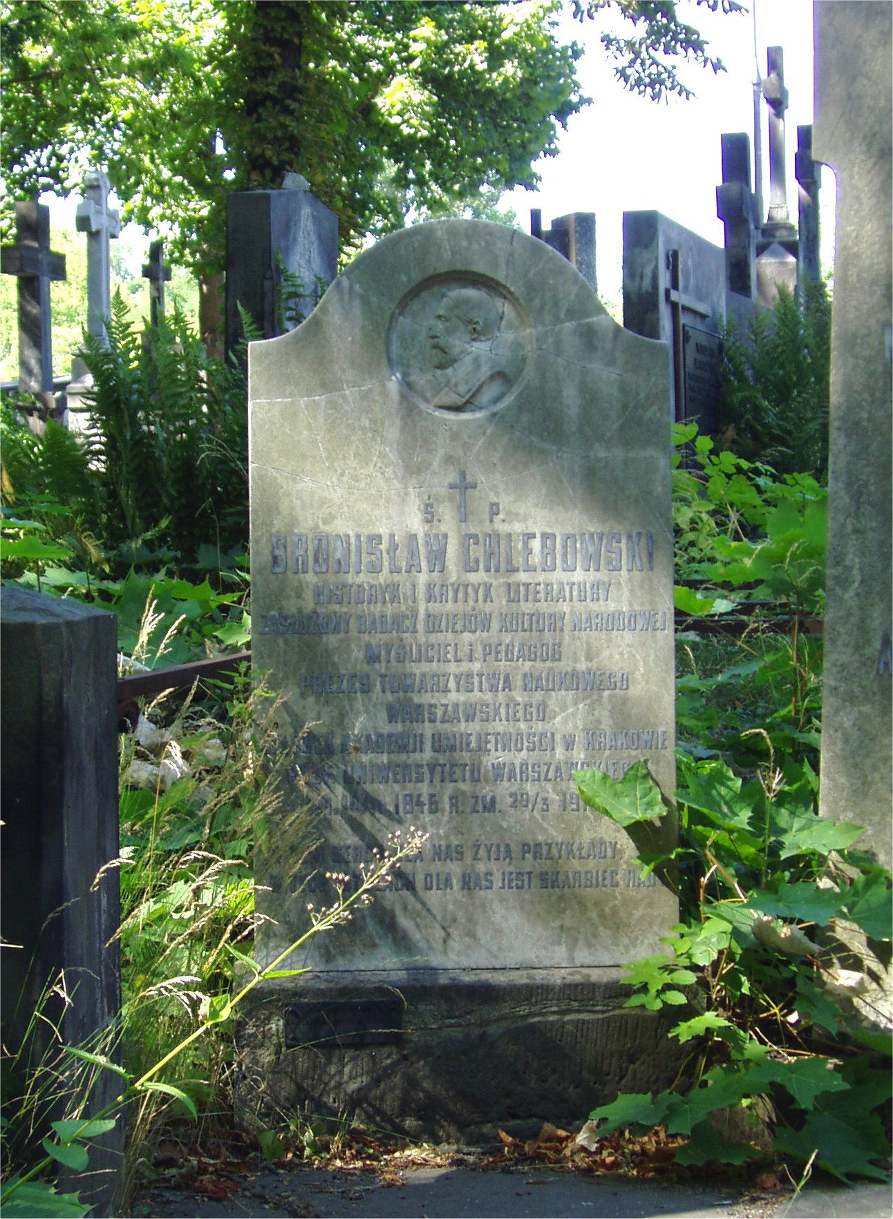 Grób Bronislawa Chlebowskiego na warszawskich Powązkach w Warszawie (fot Zu)